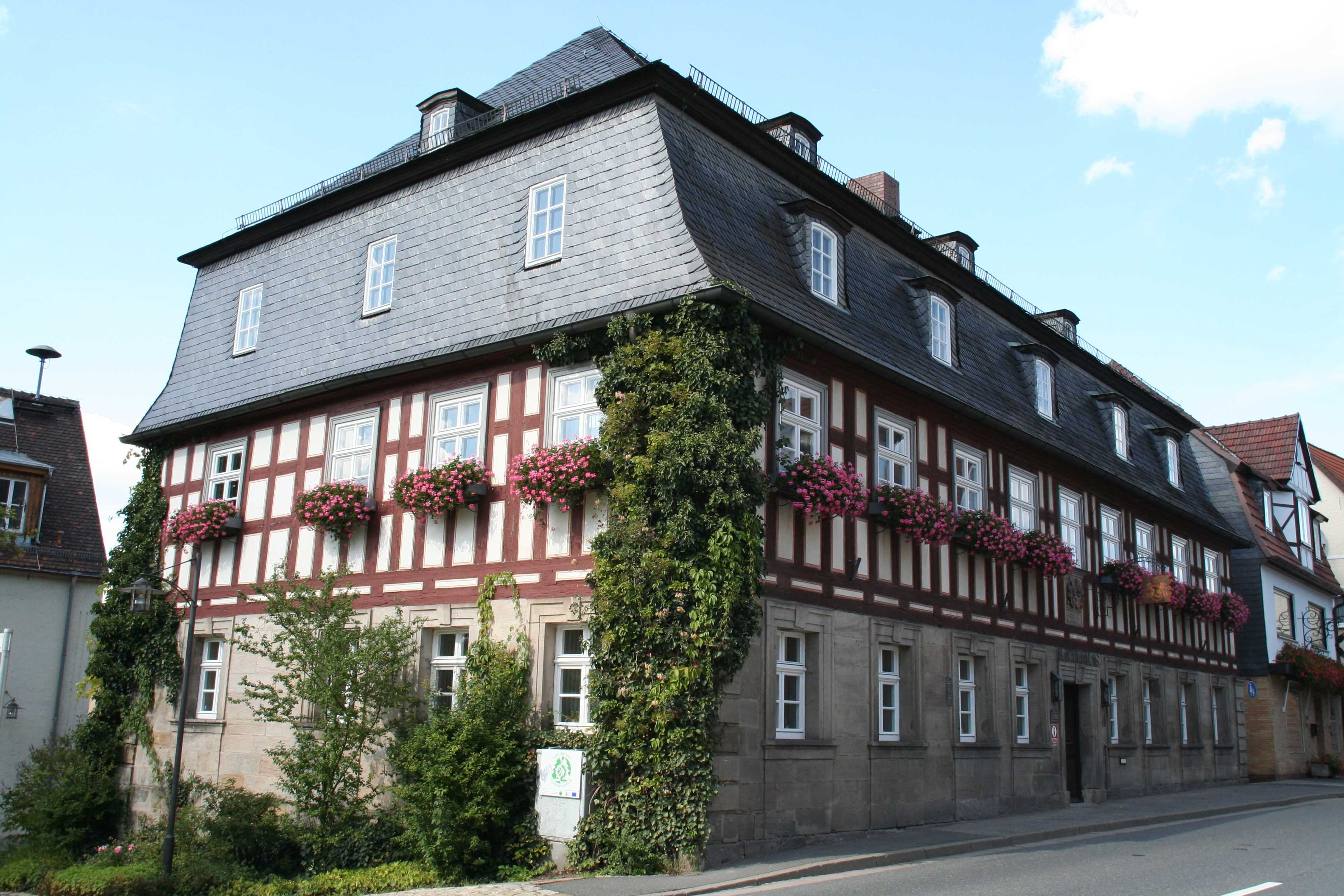 Rathaus Mitwitz im Landkreis Kronach in Bayern